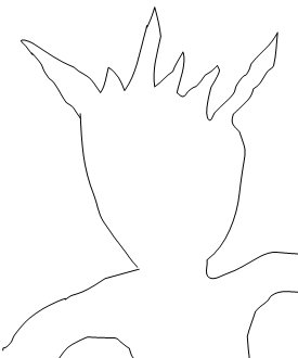 EStilo de dibujos andinos precolombinos utilizados en Cuando pase el temblor